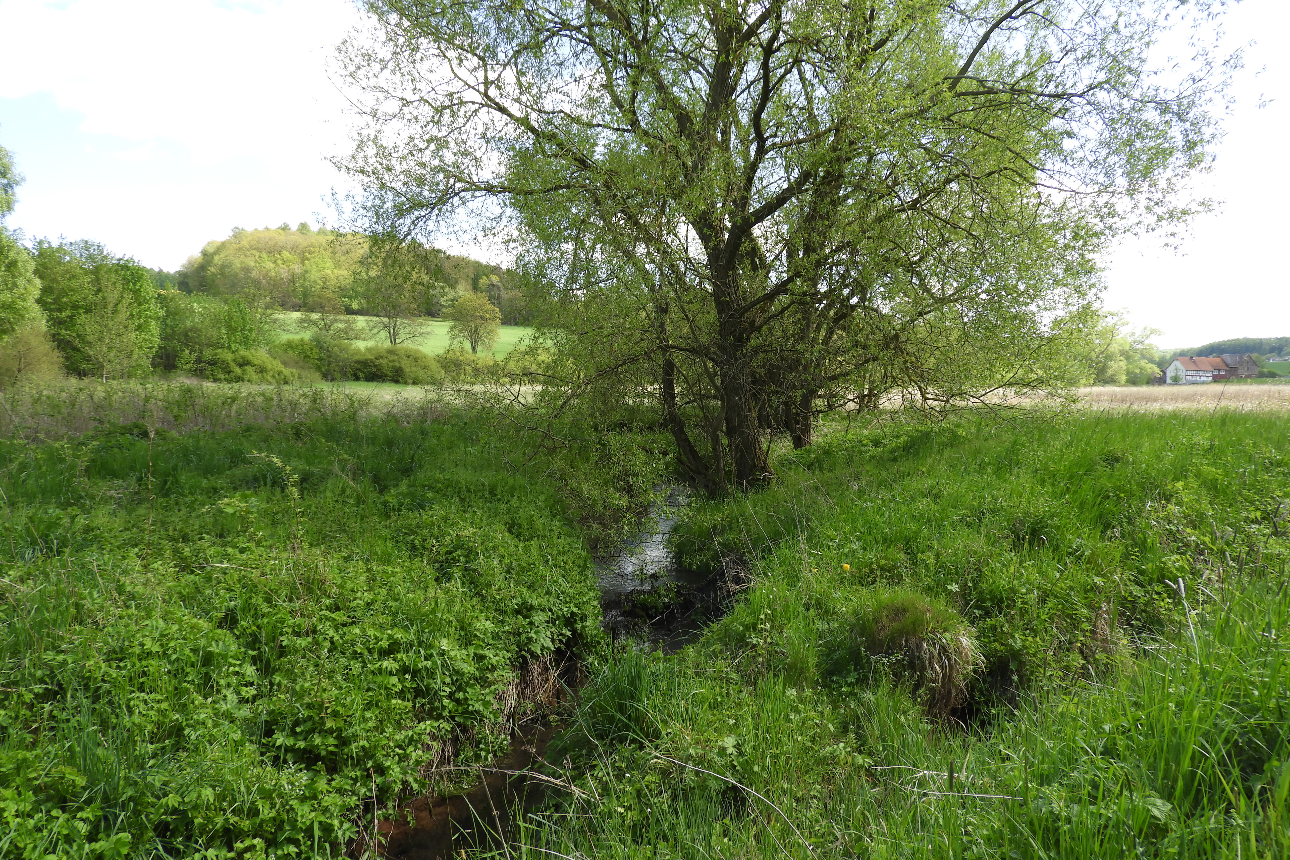 Die Sorgwiesen bei Weißenhasel sind ein kleines Feuchtgebiet im Tal der Hasel zwischen Nentershausen und Weißenhasel im osthessischen Landkreis Hersfeld-Rotenburg. Nach der landwirtschaftlichen Nutzungsaufgabe wurden die nassen Brachen mit ihren Pflanzengesellschaften als Naturschutzgebiet ausgewiesen, um den zum Lebensraum für Amphibien und Vogelarten gewordenen Bereich zu sichern und zu schützen.